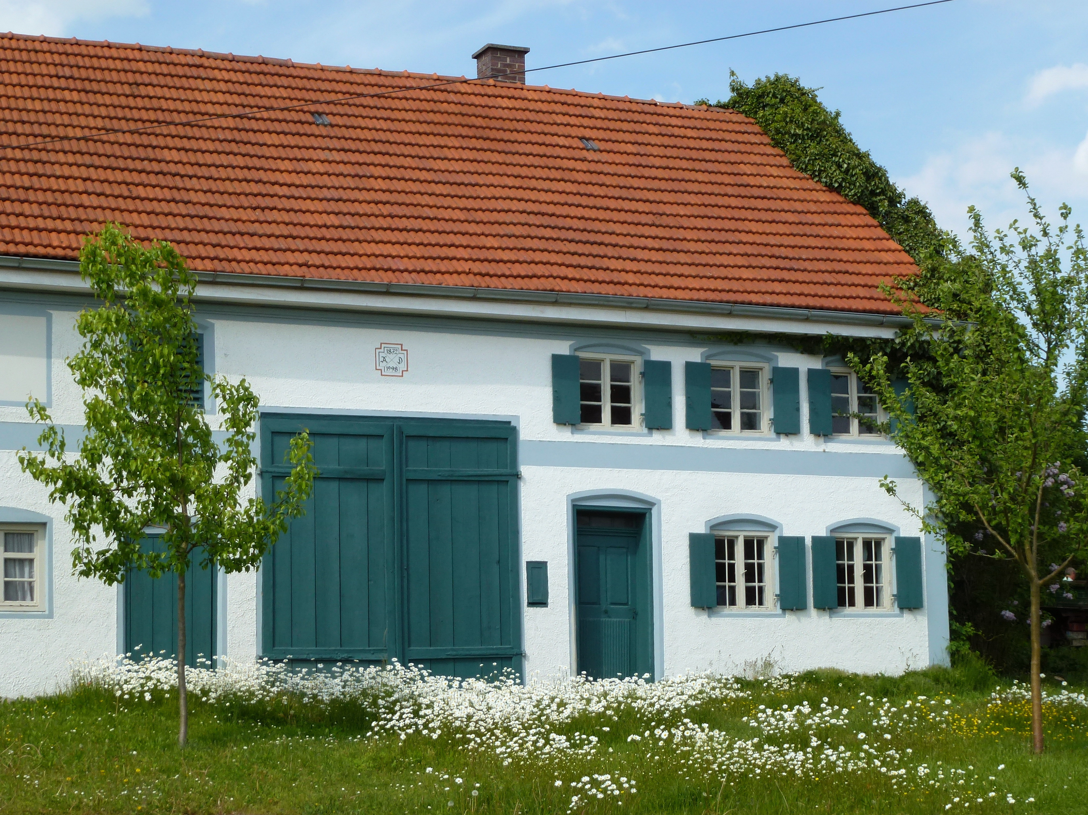 Kottgeisering, Jesenwanger Str. 8: Ehemaliges Kleinbauernhaus in Form eines Doppelhauses (Mitterstallbau). Rechte Haushälfte